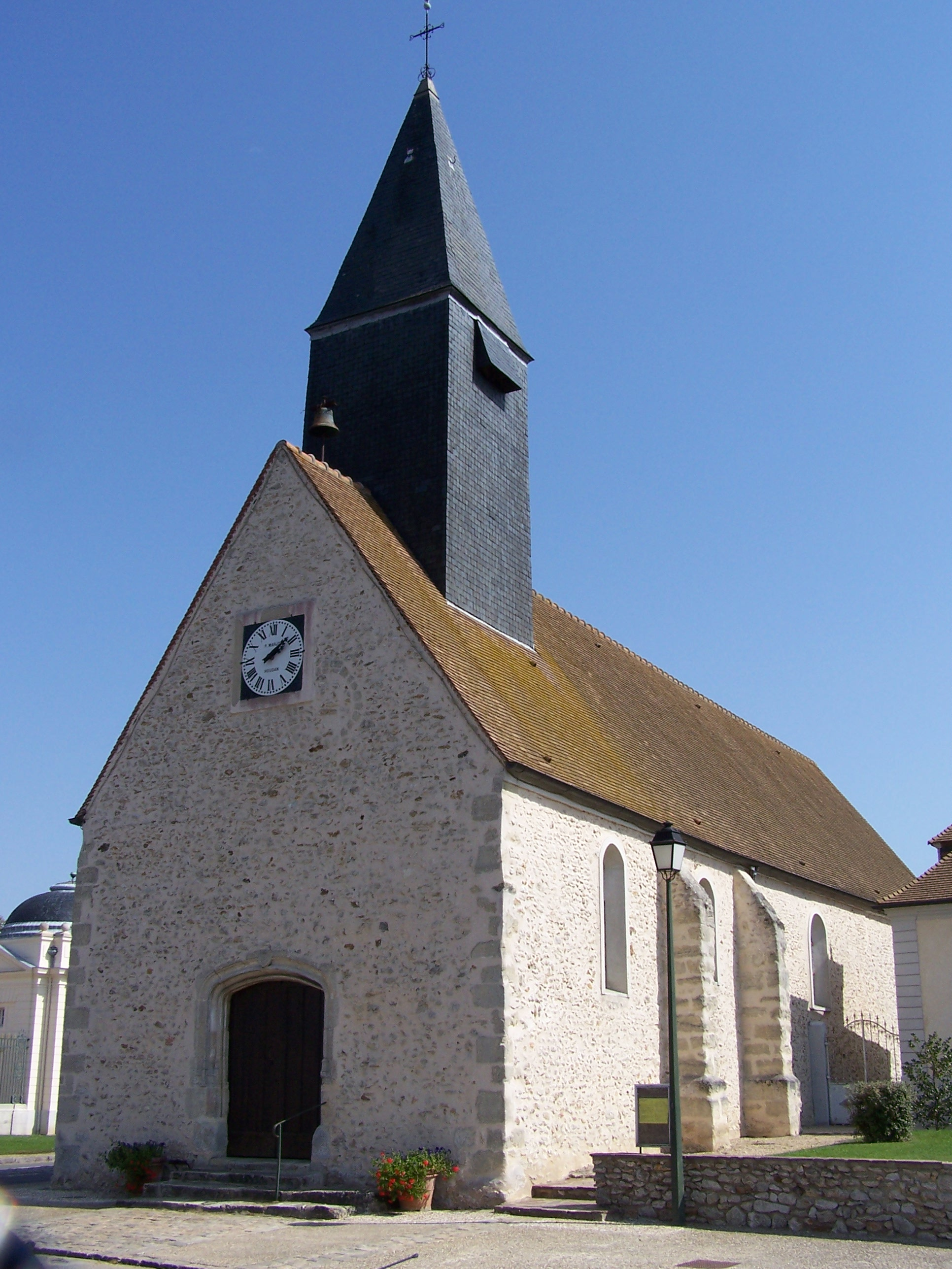 Église de Béhoust (Yvelines, France)